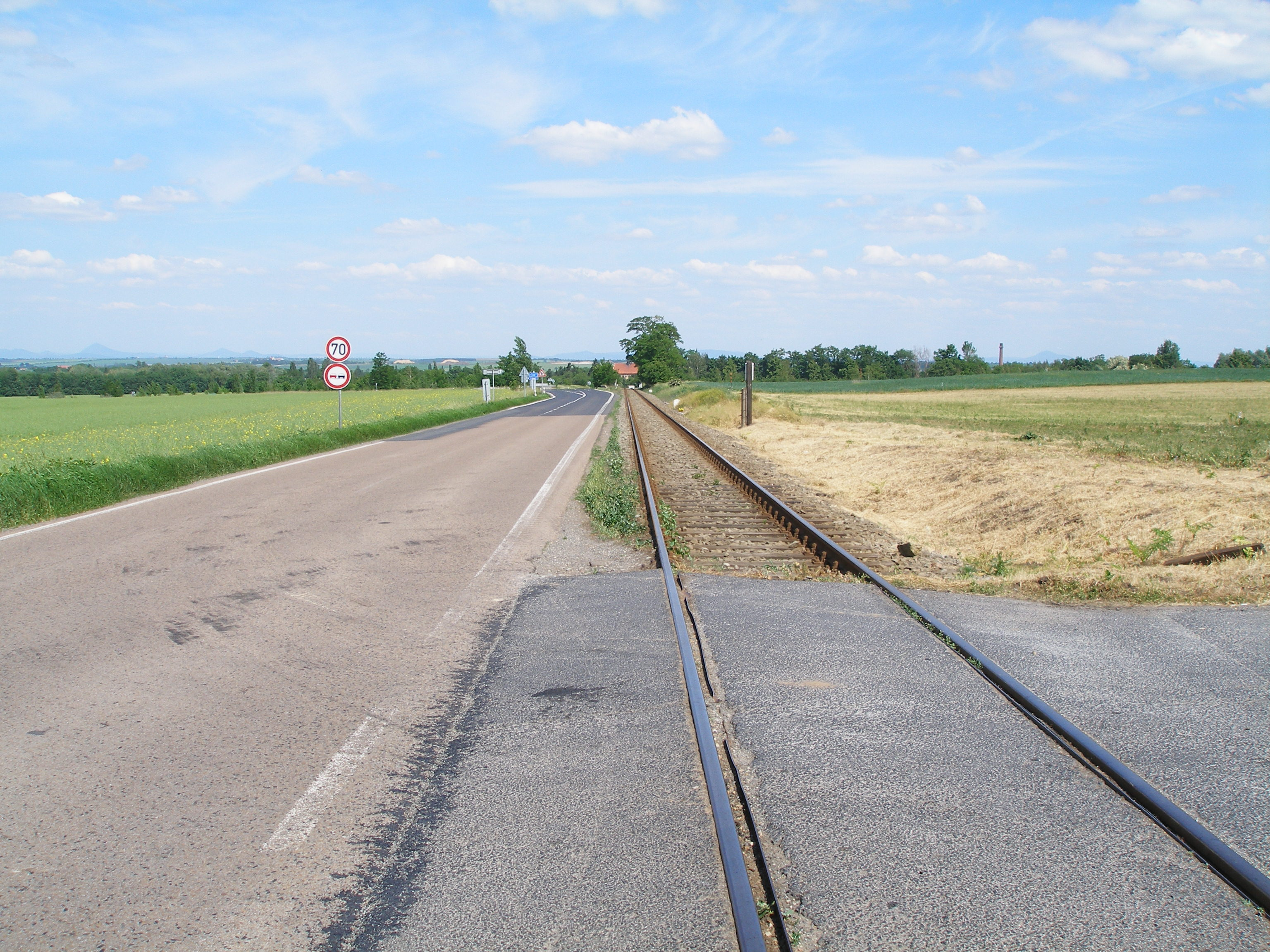 Silnice II/240 v souběhu se železniční tratí 111 k Velvarům.